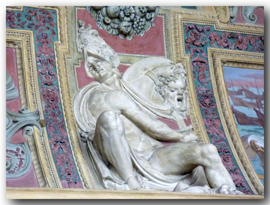 Villa Imperiale Scassi “La Bellezza” This is a photo of a monument which is part of cultural heritage of Italy.